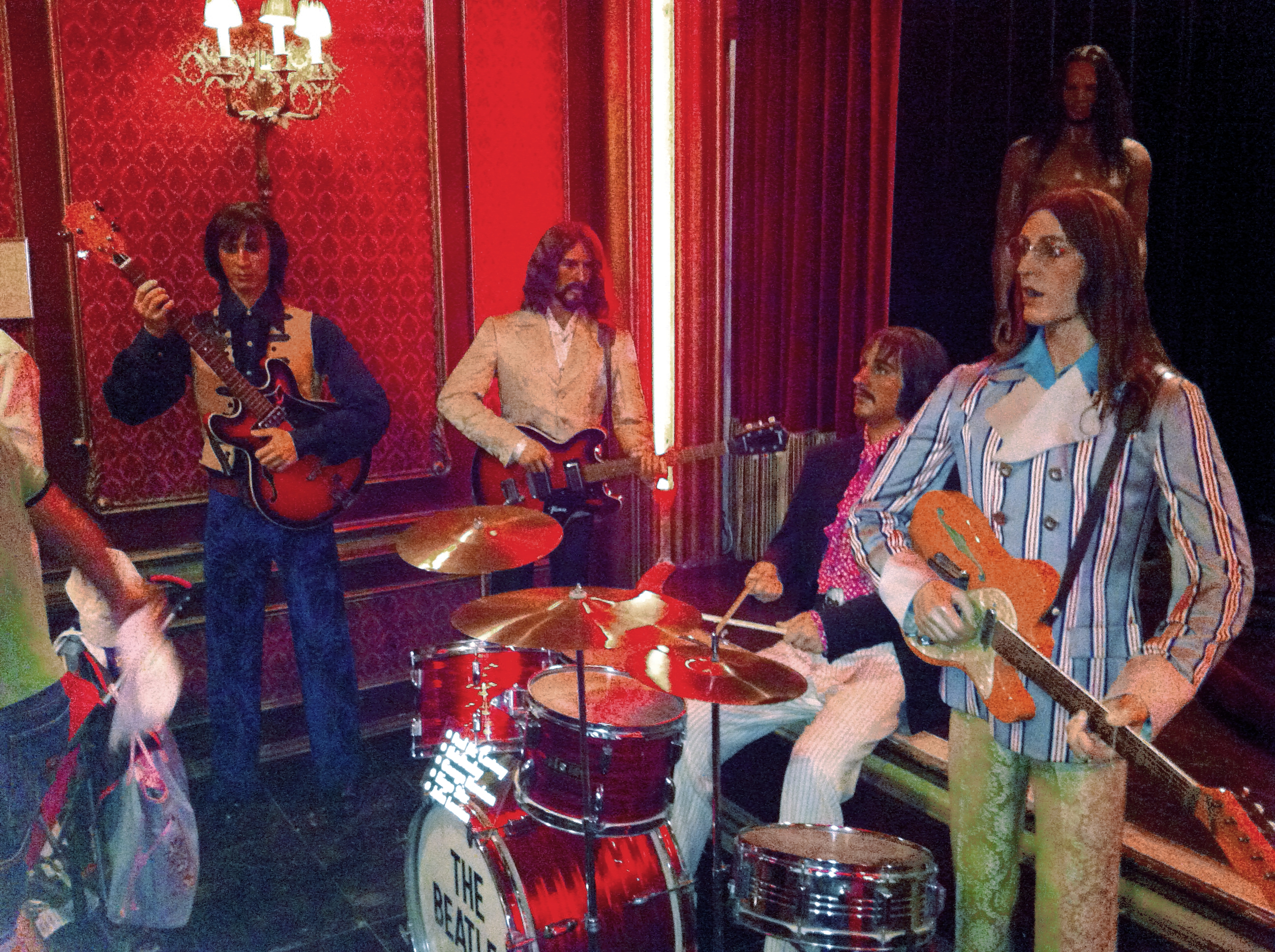 The Beatles - Madrid Wax Museum